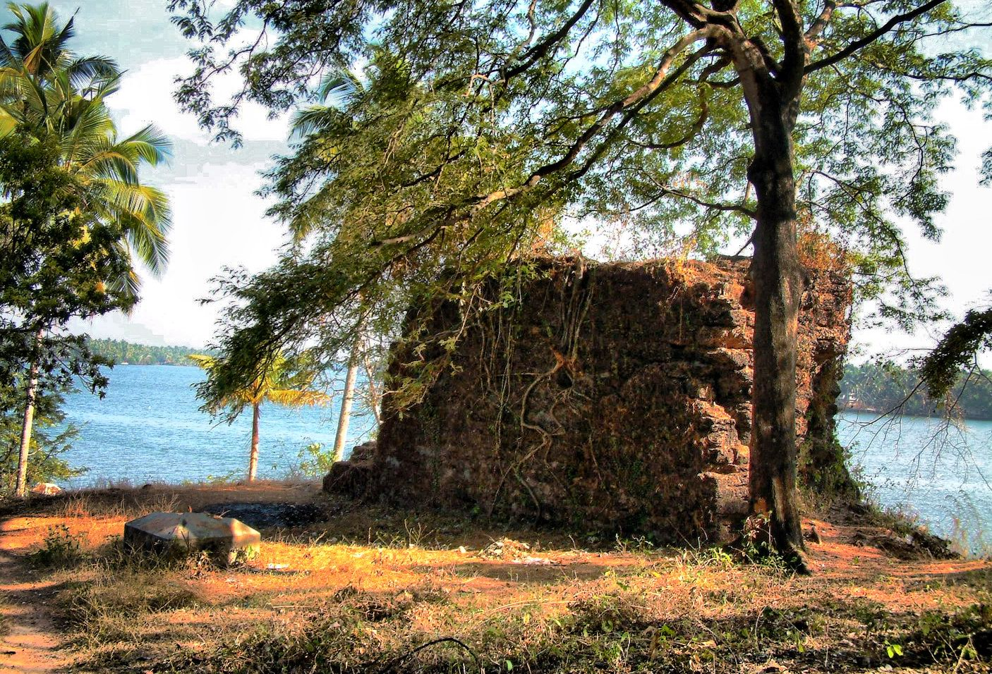 കൊടുങ്ങല്ലൂർ കോട്ട